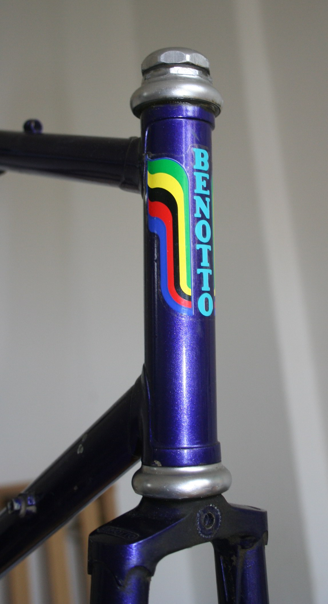 Benotto Logo on a Frame